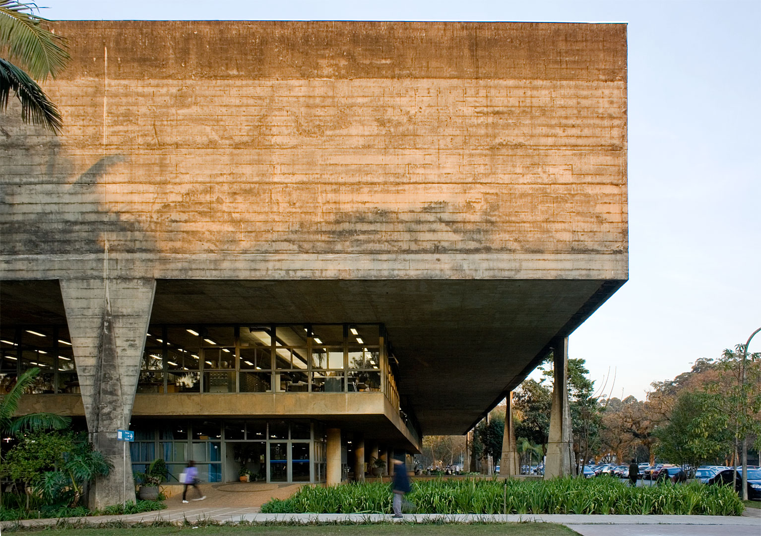 Faculdade de Arquitetura e Urbanisno - SP